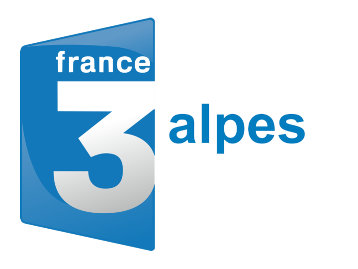 Логотип телеканала France Televisions